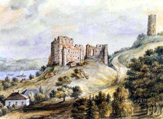 sketch